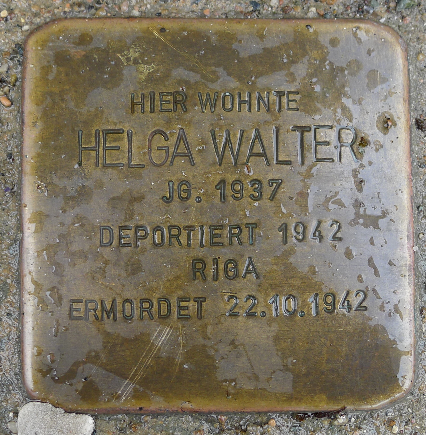 Stolperstein für Helga Walter, Lange Straße 22, Greifswald